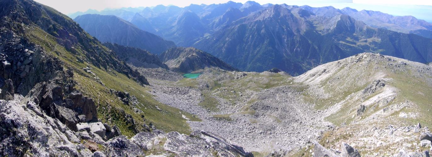 Aigüissi i Vall de Sant Nicolau, vistes des del Pic de Comaltes; la Vall de Boí, Alta Ribagorça, Catalunya